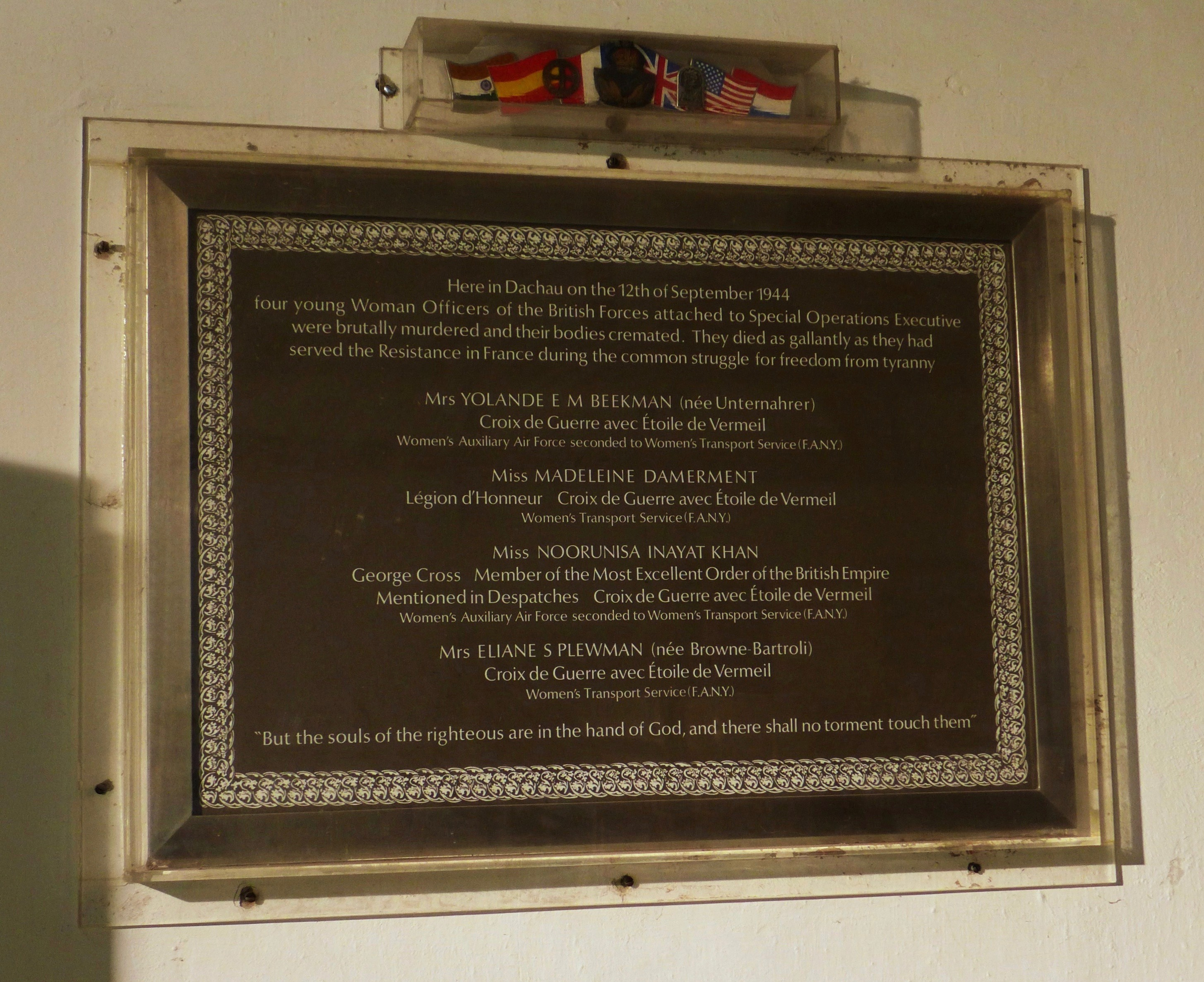 Dachau Germany Deutschland, KZ Dachau Krematorium SOE Yolande Beekman, Madeleine Damerment, Noor-un-Nisa Inayat Khan, Eliane Plewman